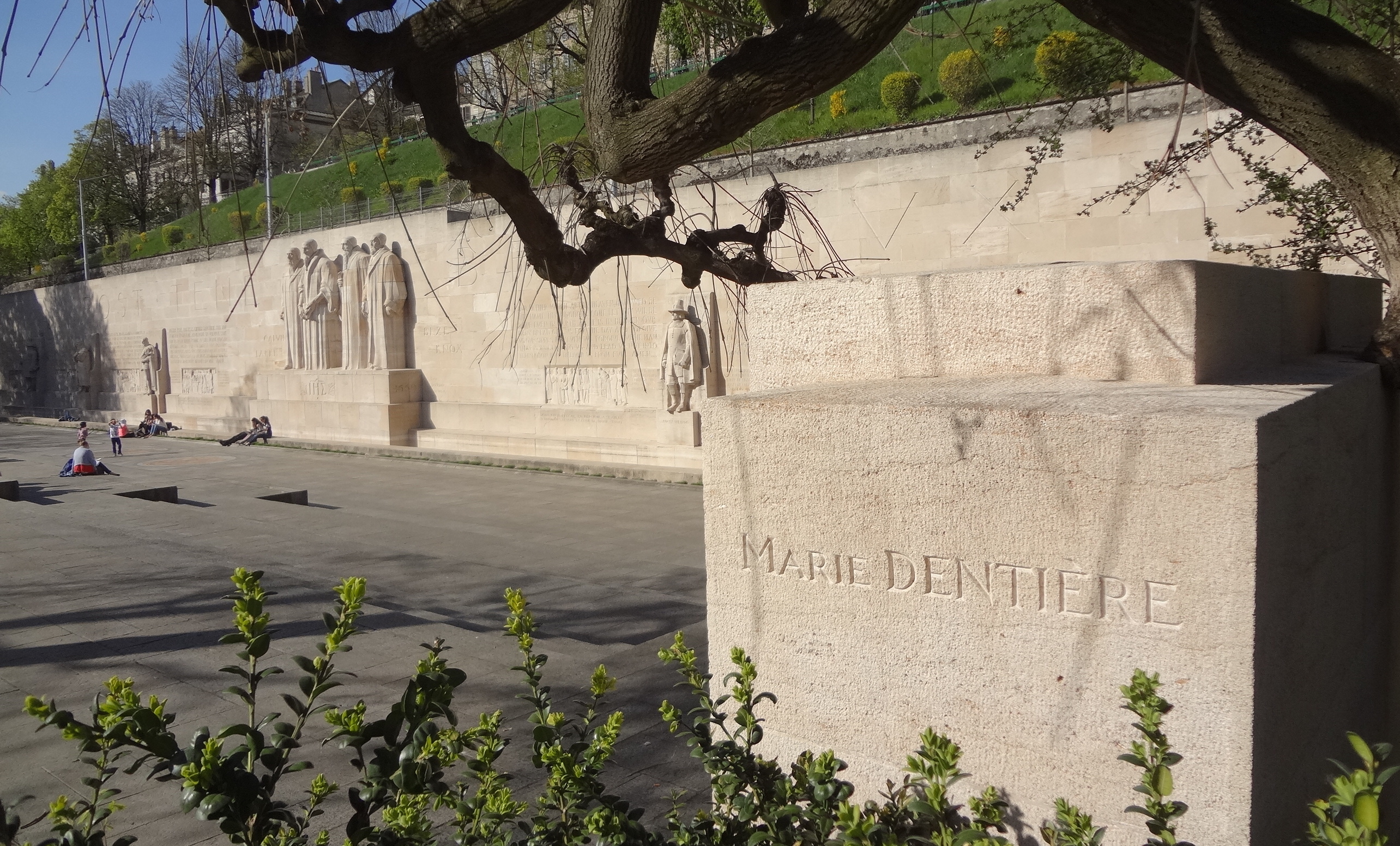 Inscription du nom de Marie Dentière sur le Mur des Réformateurs à Genève, à l'arrière de la stèle dédiée à Zwingli.